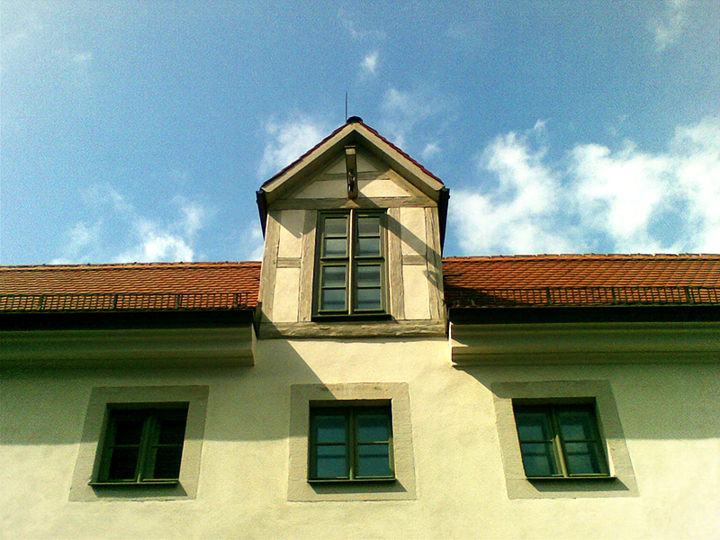 Giebel der Theologischen Fakultät der MLU Halle-Wittenberg in den Franckeschen Stiftungen zu Halle, Haus 30